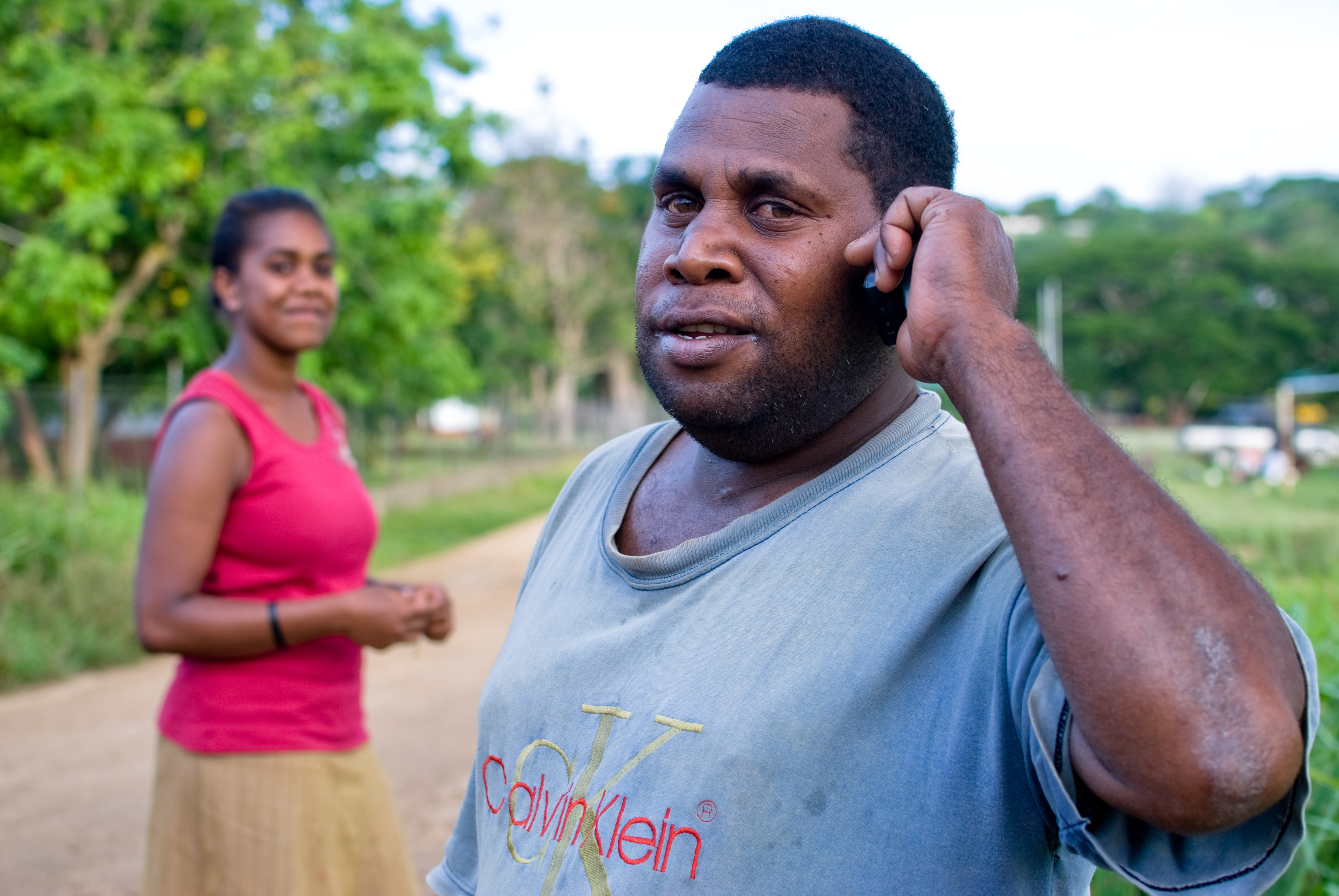 Favourite Photos 2010